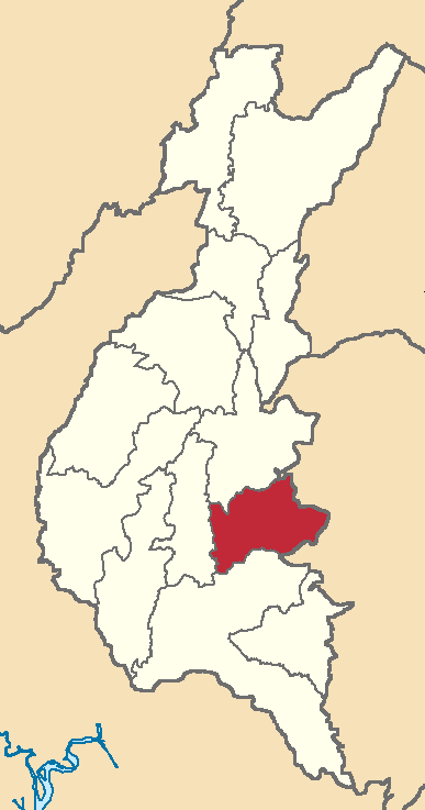 Mapa localizador del cantón en Los Ríos, Ecuador